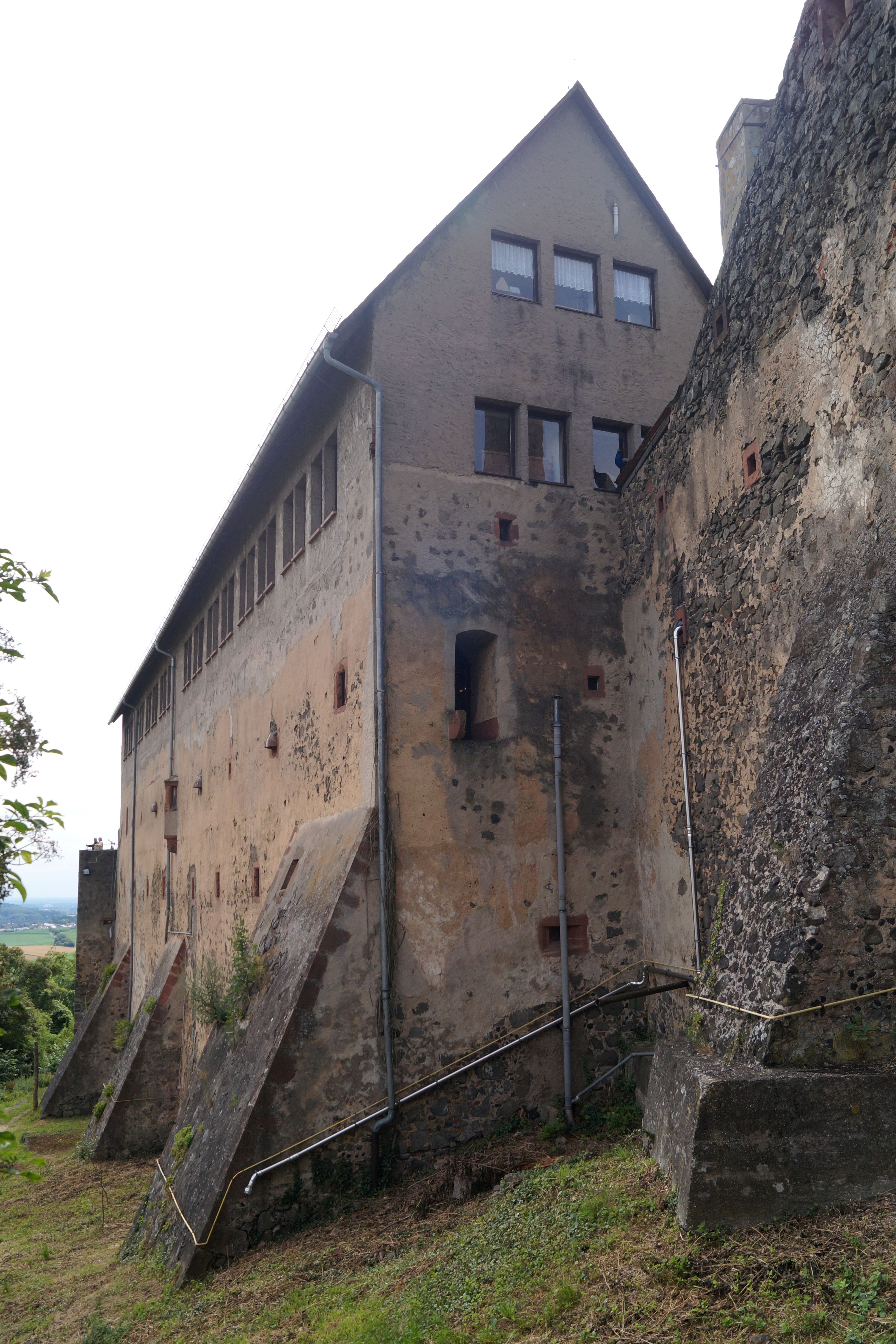 Burg Ronneburg, Hessen, Blick entlang des Marstalls (Feldseite) nach SW.